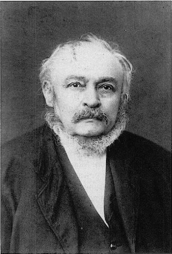 Achaz Stehlin Vizepräsident der badischen verfassunggebenden Versammlung 1849 Depicted person: Achaz Stehlin – German lawyer